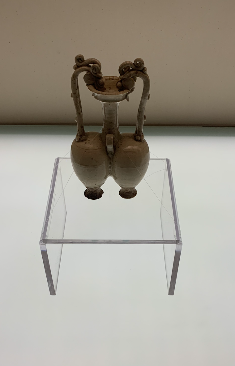 中文（中国大陆）: 陕西西安市李静训墓出土，与中国国家博物馆的一件藏品形制完全相同的隋代白釉双龙柄联腹传瓶